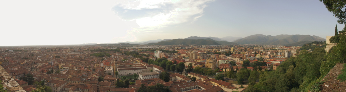 Brescia vista dal castello